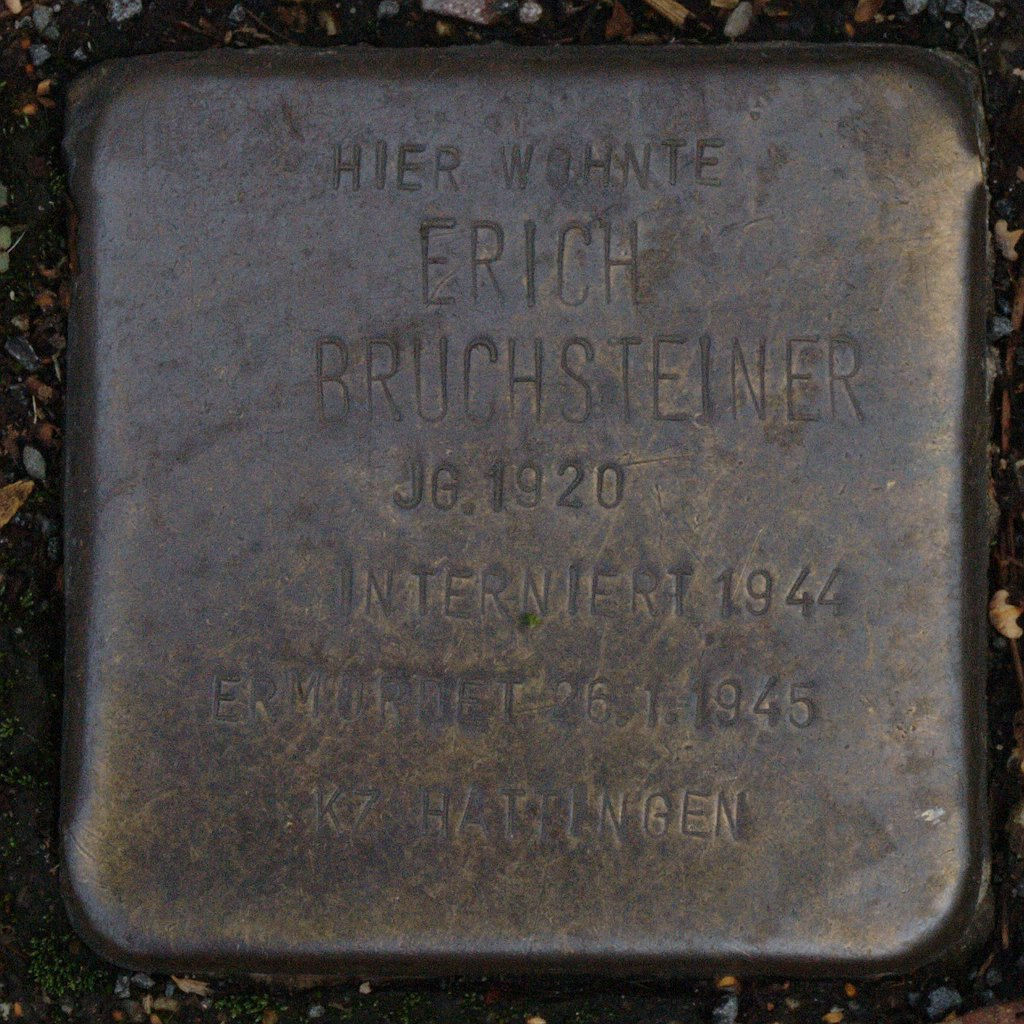 Stolperstein in Hattingen Erich Bruchsteiner